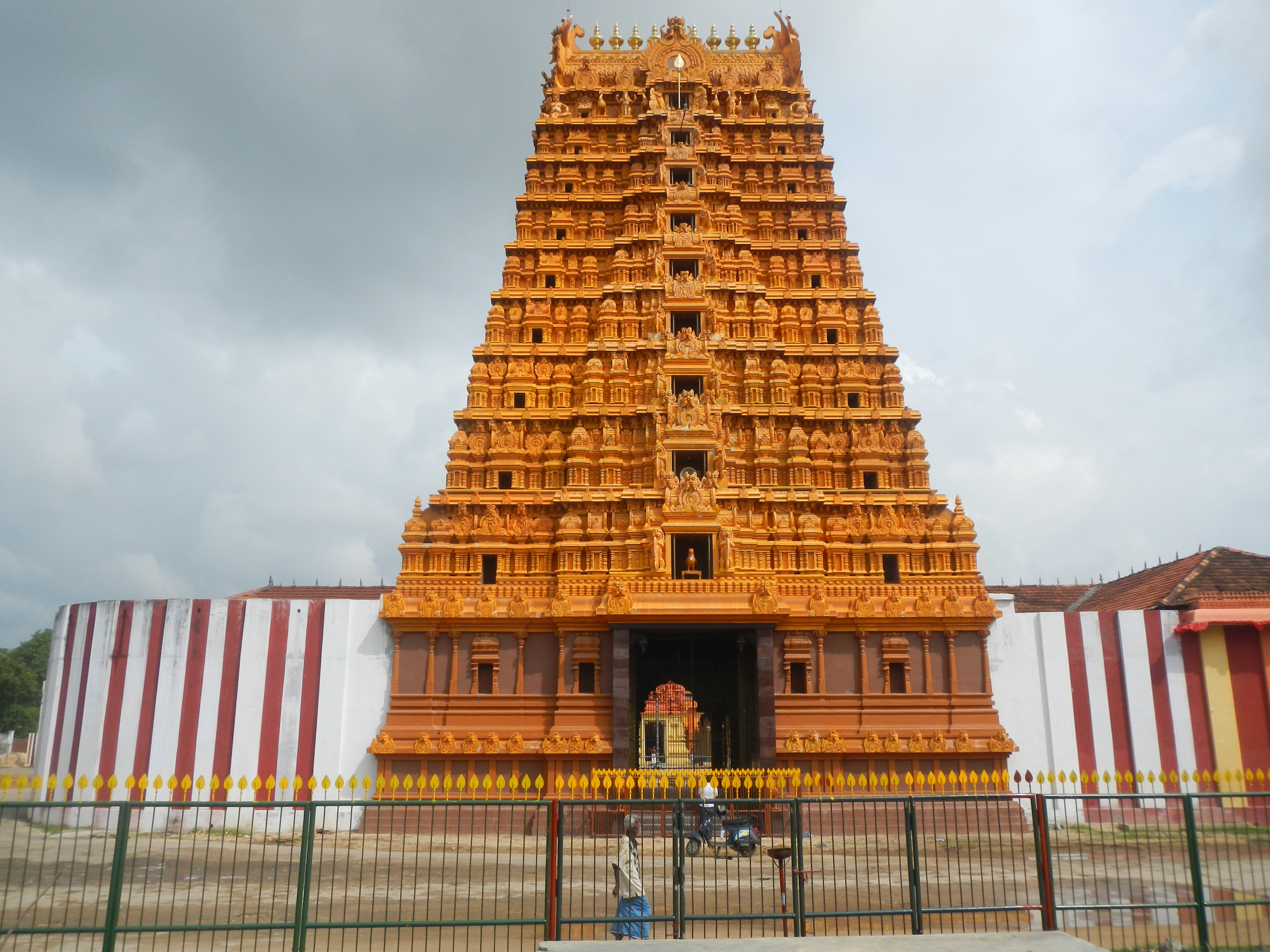 நல்லூர்க் கந்தசுவாமி கோவிலின் தென்புறத்தே 2011 ஆம் ஆண்டு நிர்மாணிக்கப்பட்ட் இராஜகோபுரம்